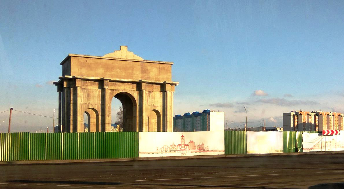 Магілёў. Будаўніцтва Трыўмфальнай аркі.